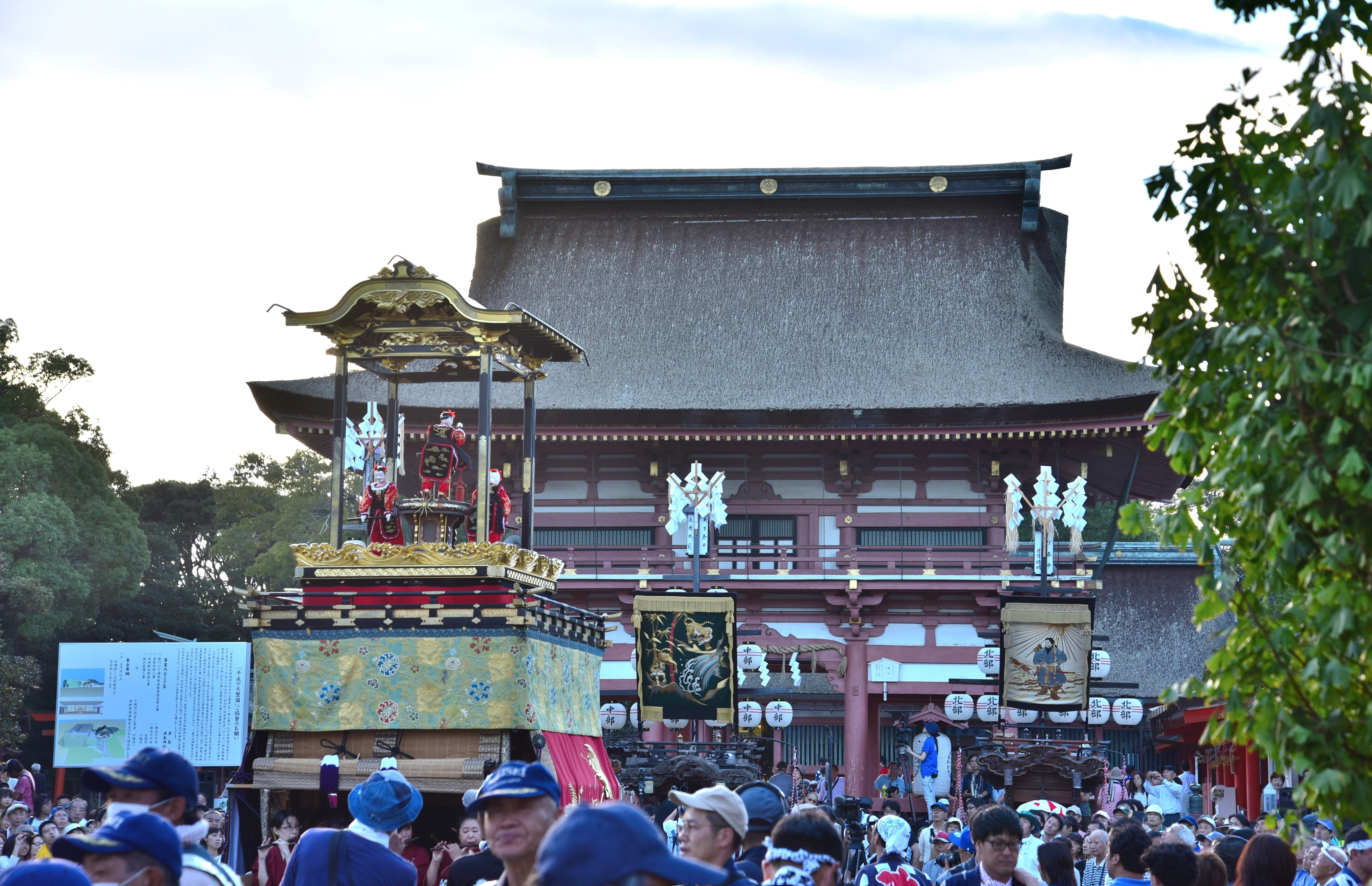 津島神社楼門前にて、からくり奉納が行われる Nikon D750